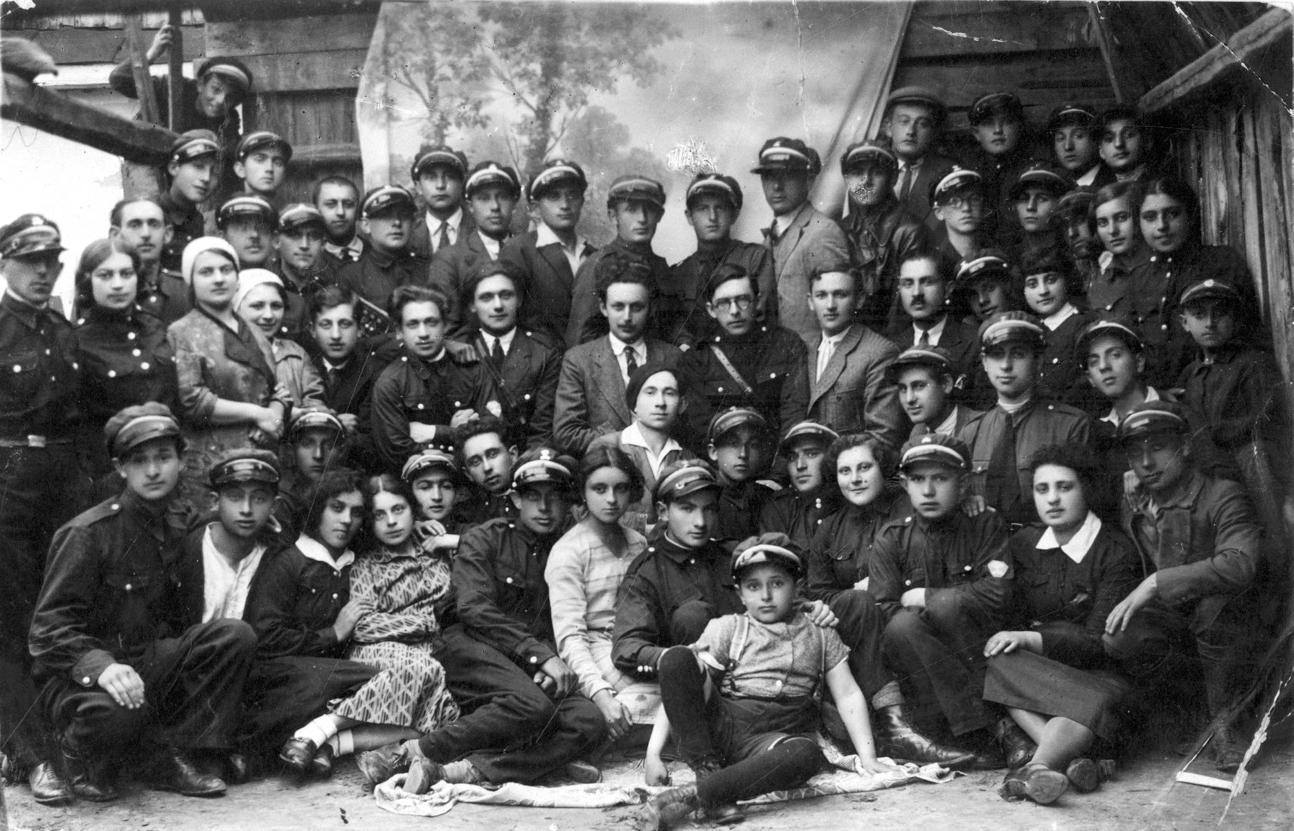 גדוד הכשרה של בית"ר, קוסטופול (והלין). הקצינים שמשון יוניצמן וגם יוסף כרוסט יושבים במרכז.